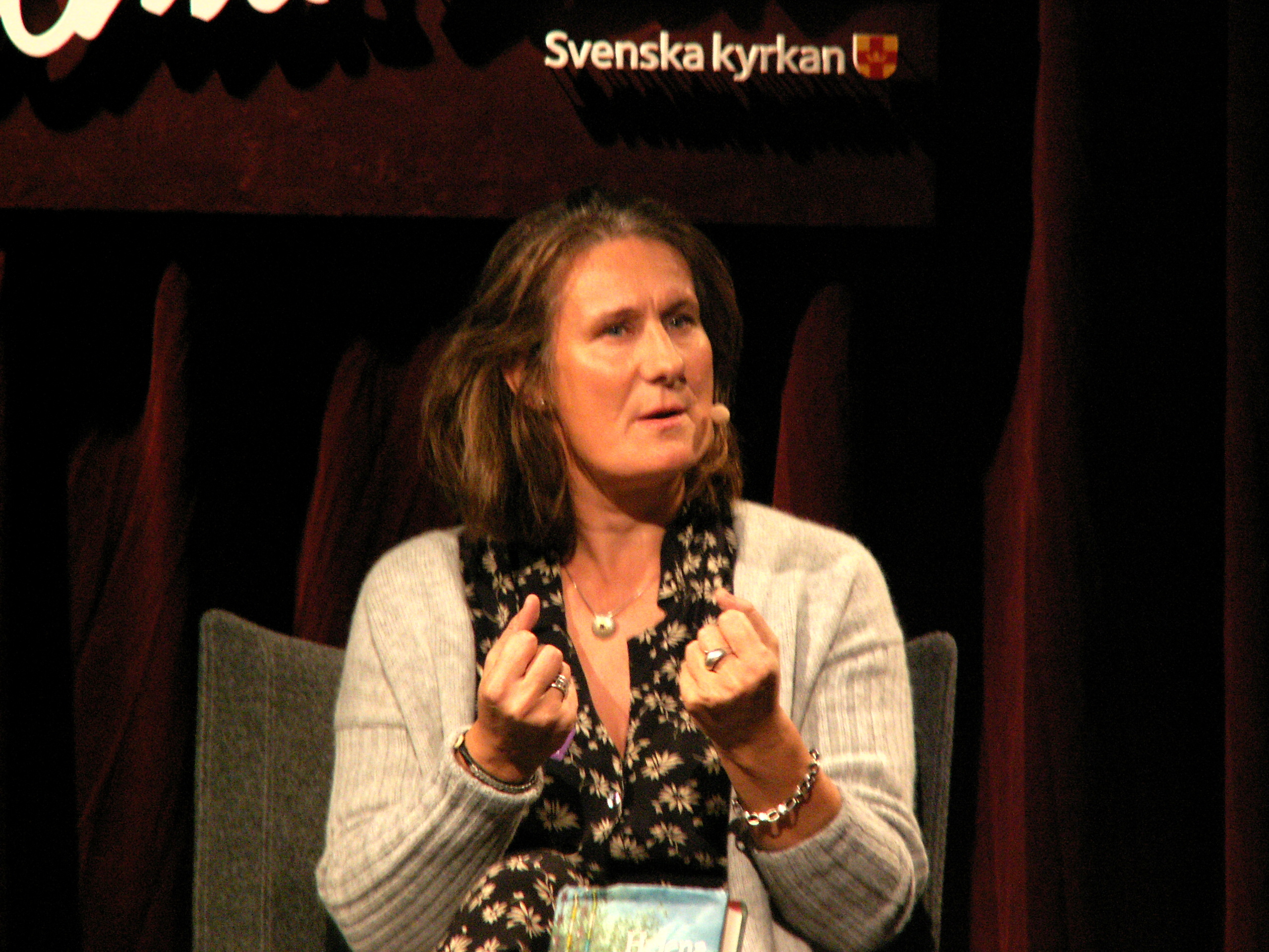 Helena Thorfinn på Svenska kyrkans Se människan-scen på Bokmässan 2017.